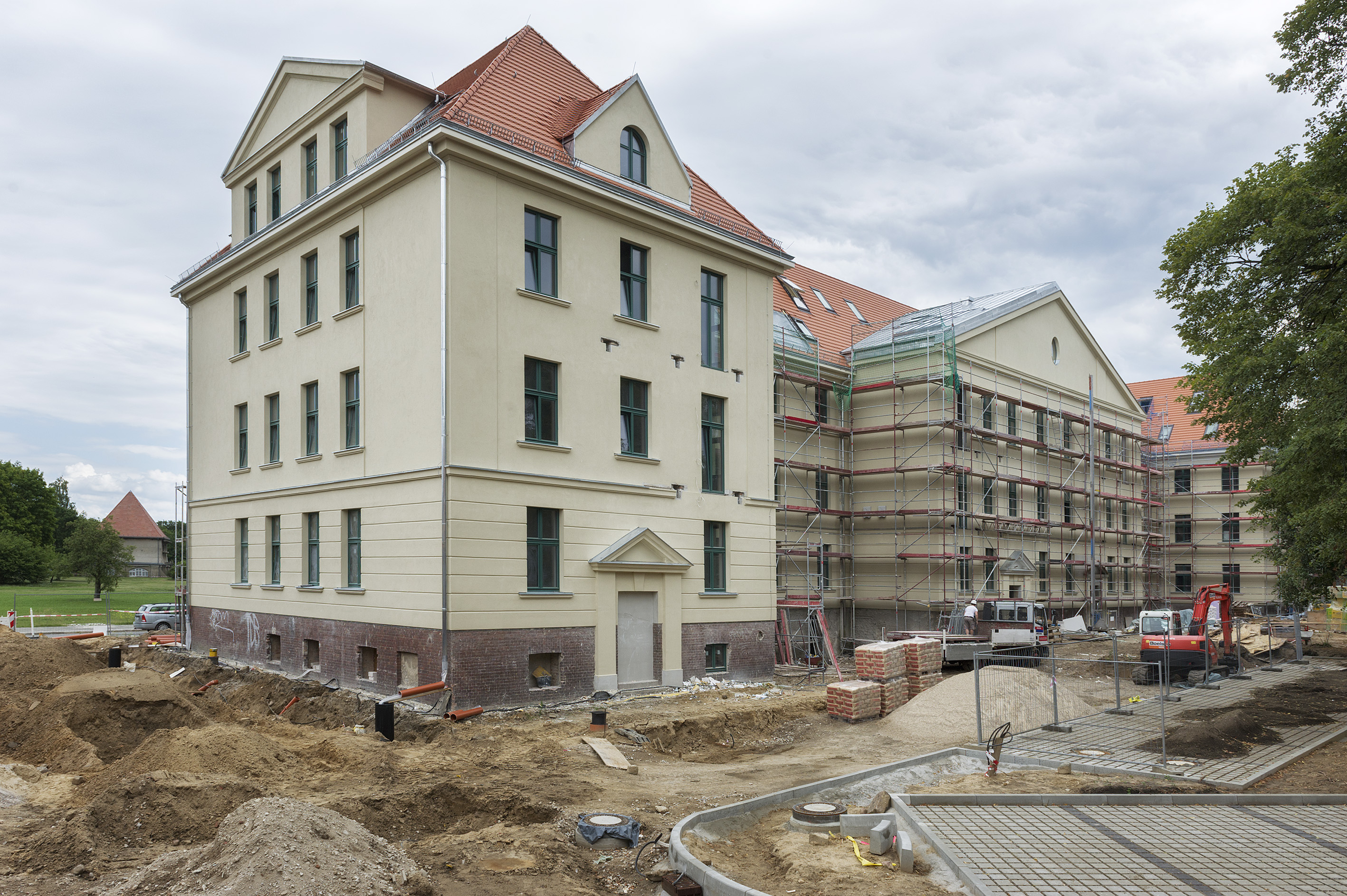 Königs Wusterhausen, Funkerberg. Ehem. Mannschaftsgebäude während der Sanierung, 2015.